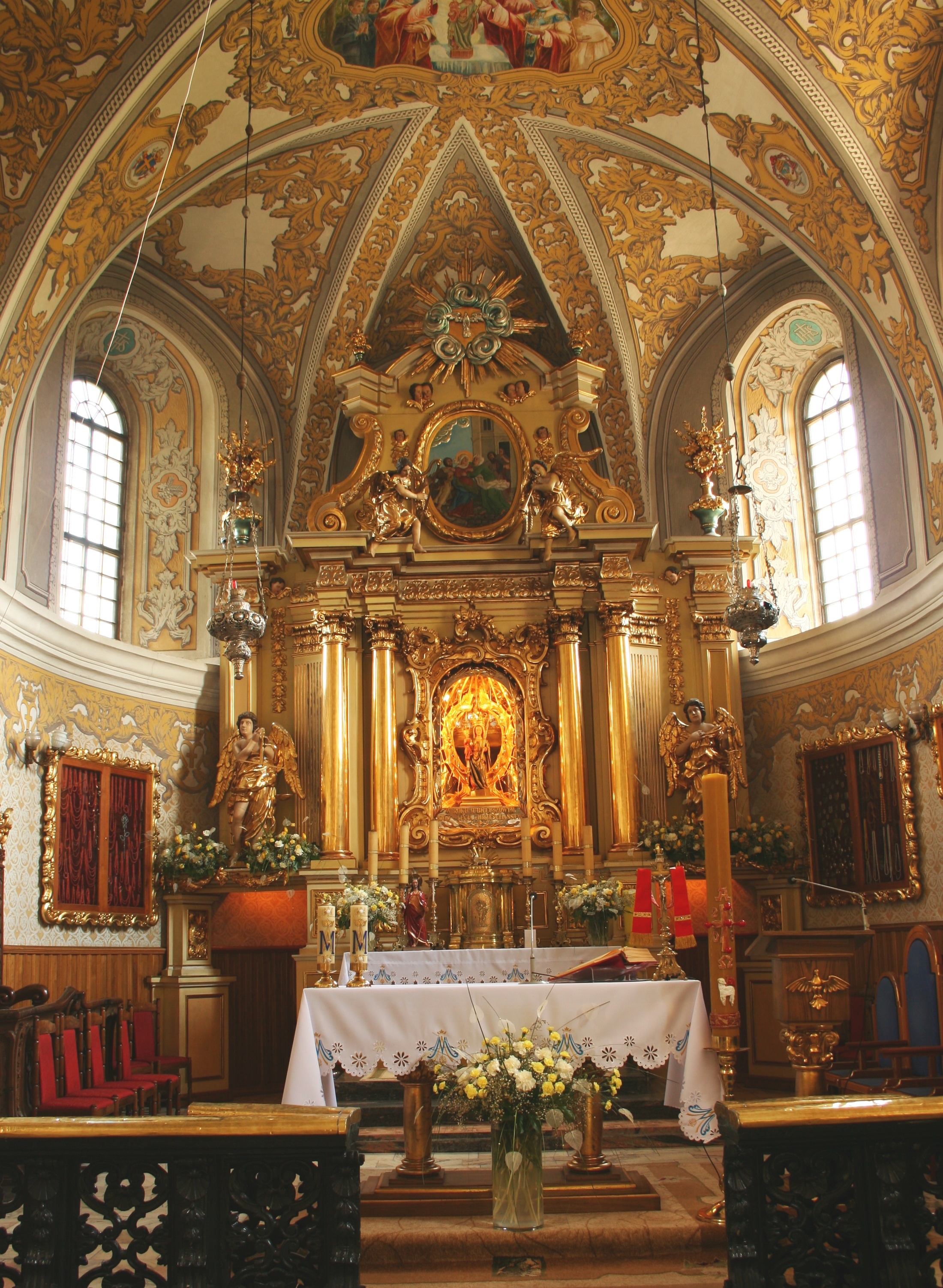 Sanktuarium Matki Bożej Leśniowskiej Patronki Rodzin w Żarkach Leśniowie - ołtarz, województwo śląskie, powiat myszkowski